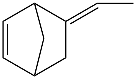 Structuur van ethylideennorborneen (ENB)